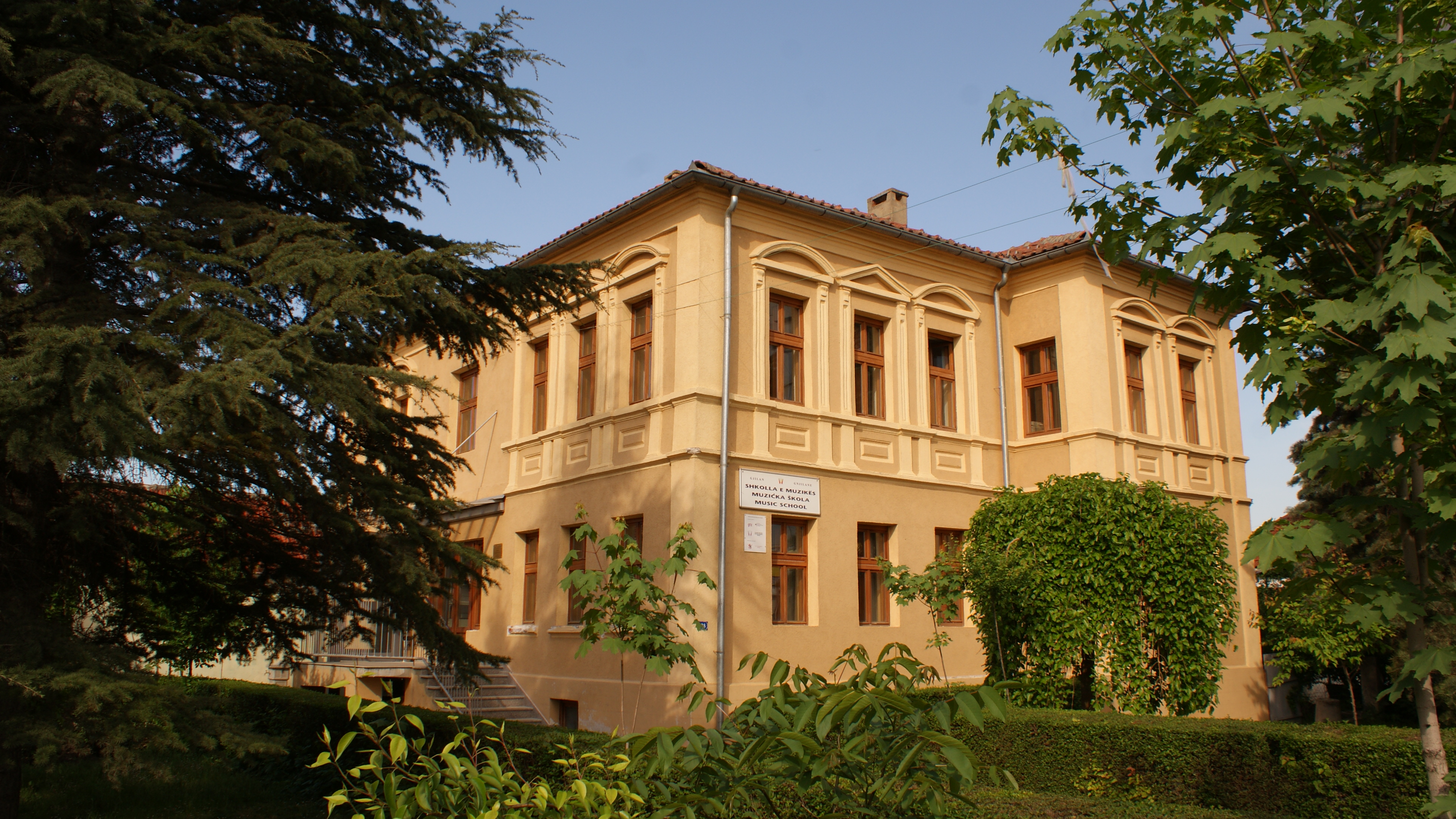 Shkolla e muzikës në Gjilan (ish saraji i Mustafë Pashës)